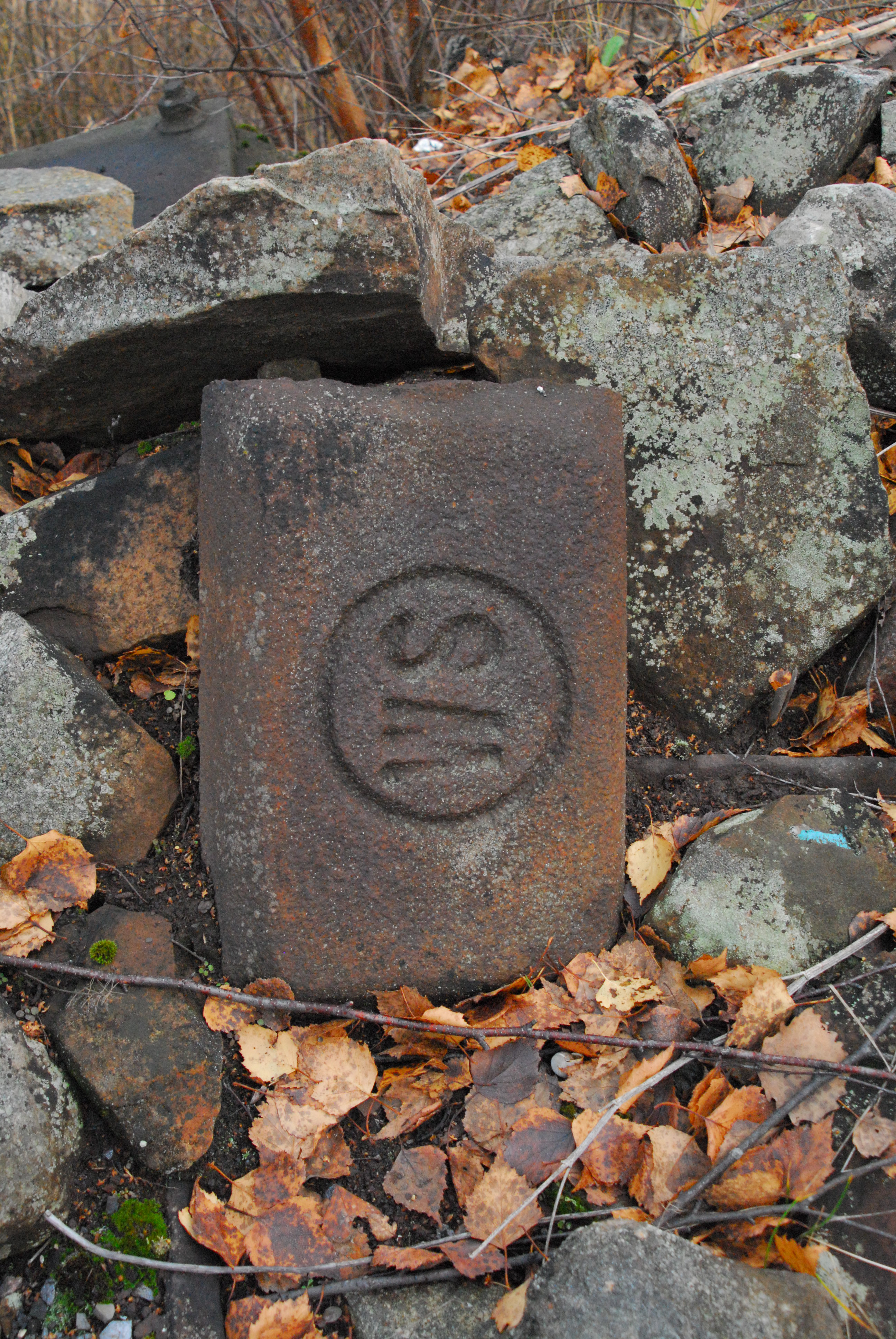 Horndals bruk, Horndal, Sverige/Sweden. Stängt/closed 1979